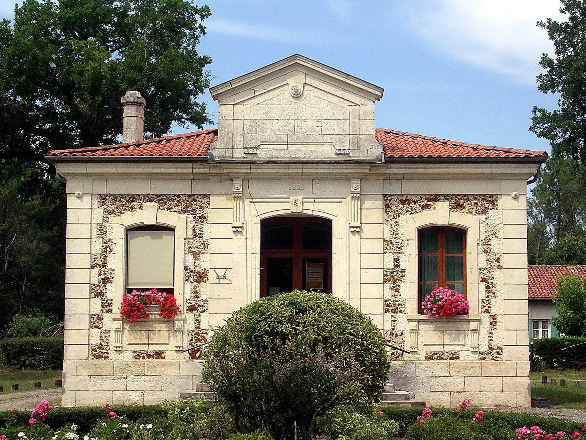 Mairie d'Uza, dans le département français des Landes